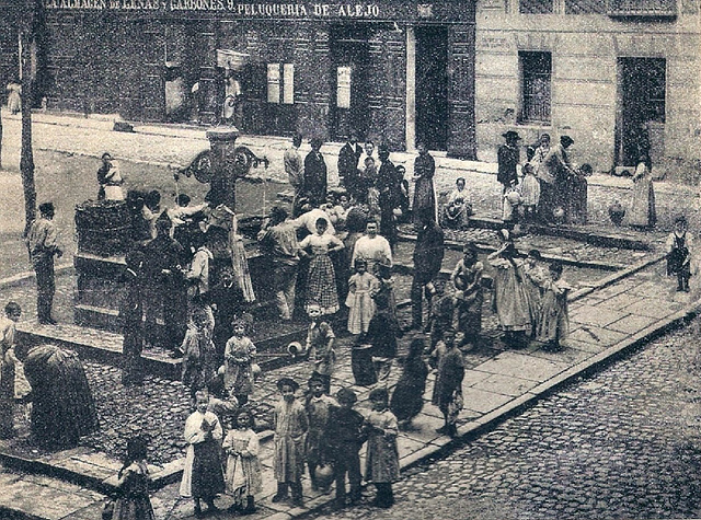 Plaza de San Gregorio (luego Plaza de Chueca), Madrid en 1895